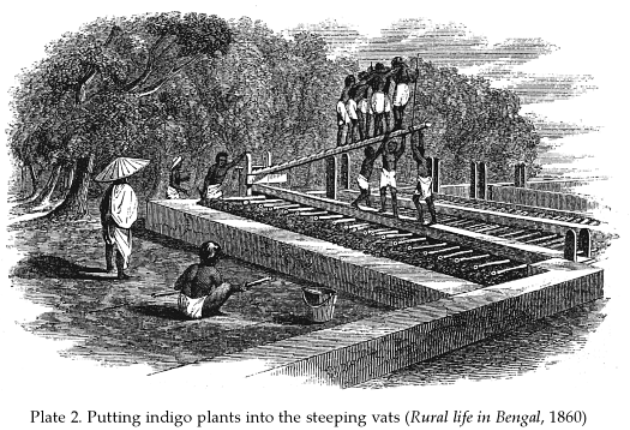 Les indigotiers sont mis à macérer dans des bassins. (Putting indigo plants into steeping vats)